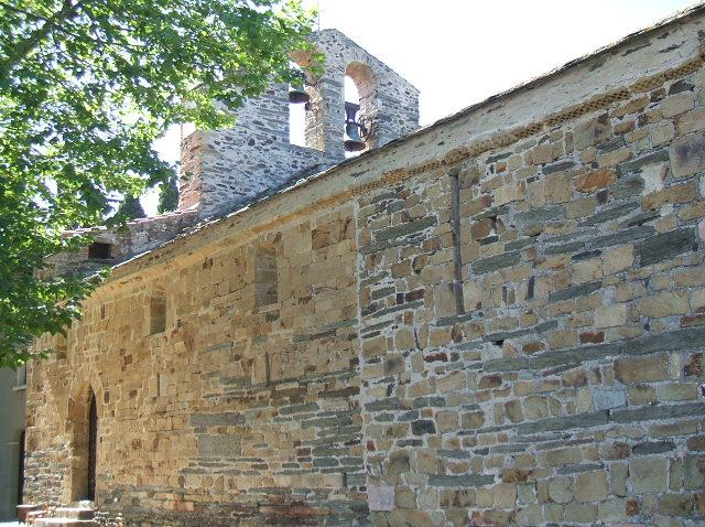 Chapelle de la Trinité de Prunet et Belpuig (66 - Pyrénées Orientales) : Mur méridional et clocher